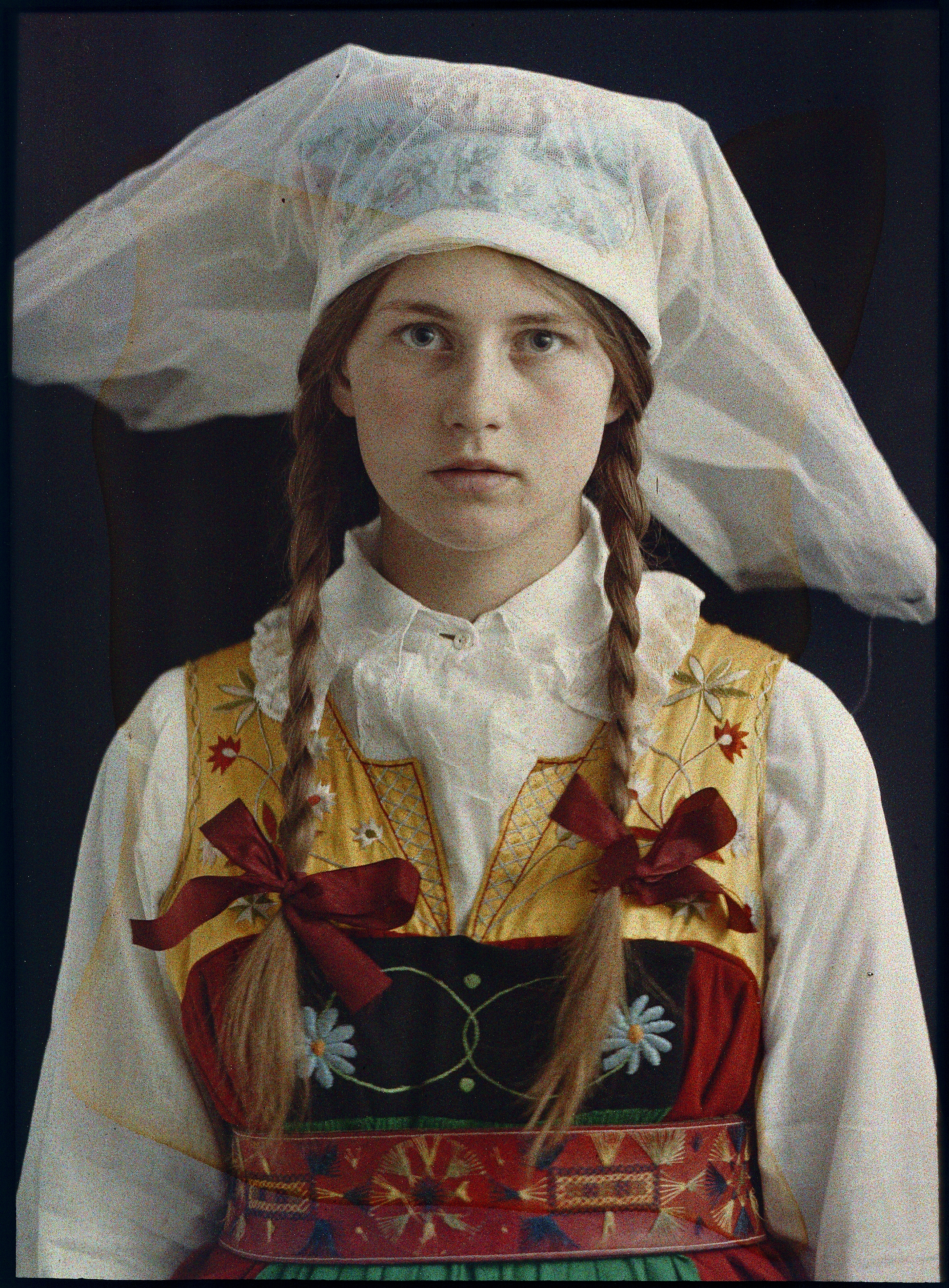 Agfa-autokrom. Serie "Margit". Porträtt av flicka i vingåkersdräkt.